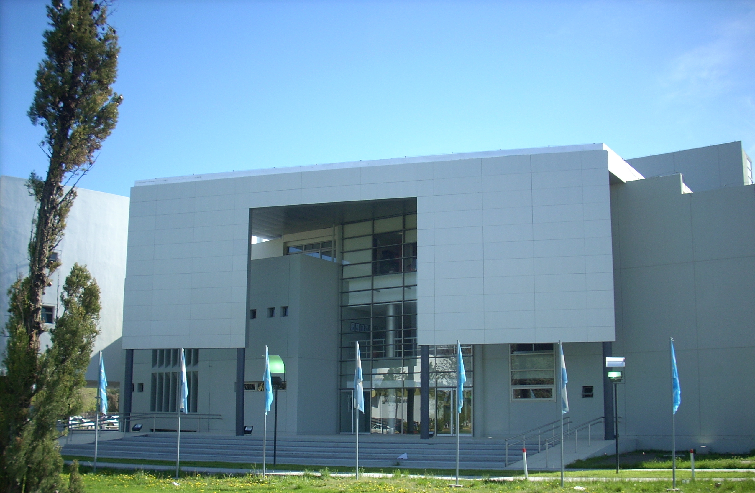 Edificio de la Legislatura de la Provincia del Chubut, ubicado en Rawson